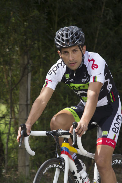 Walter Pedraza con el equipo EPM-UNE 2014